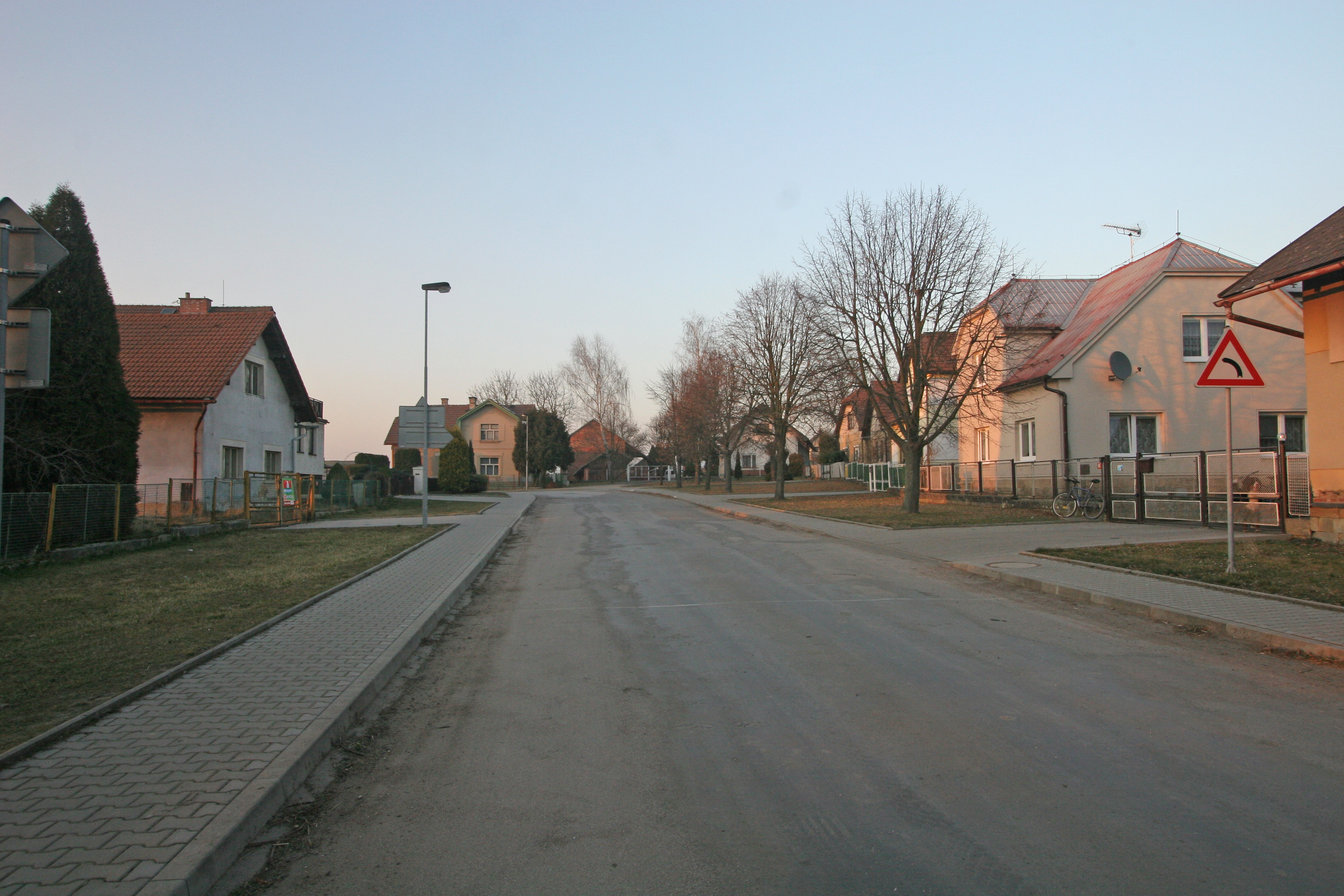 Třtěnice čp. 40